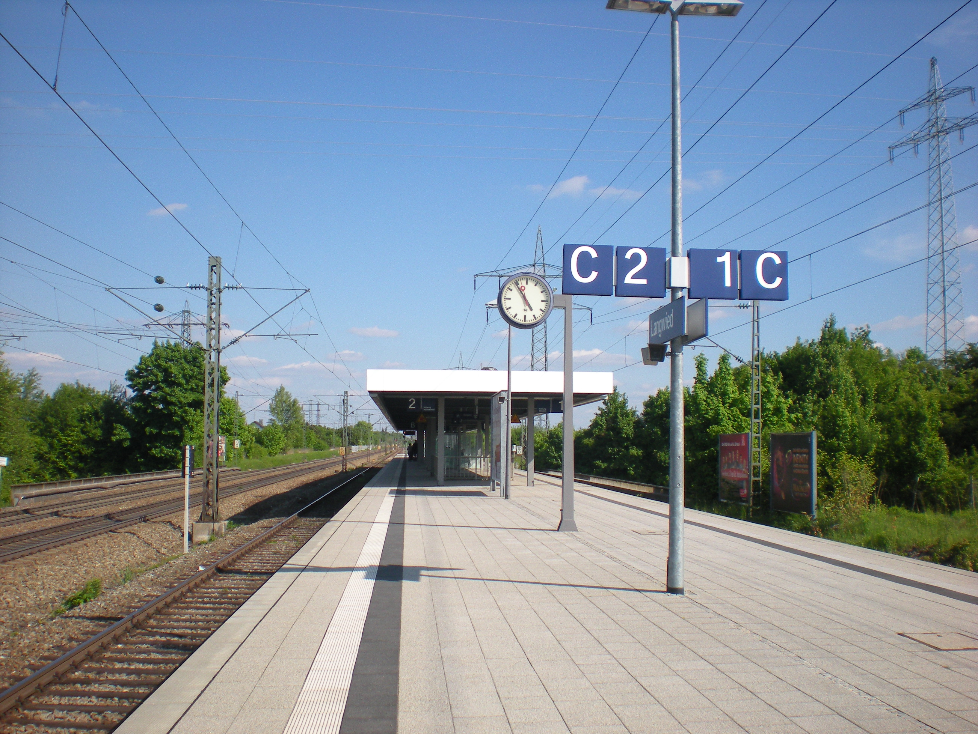 Bahnhof München-Langwied